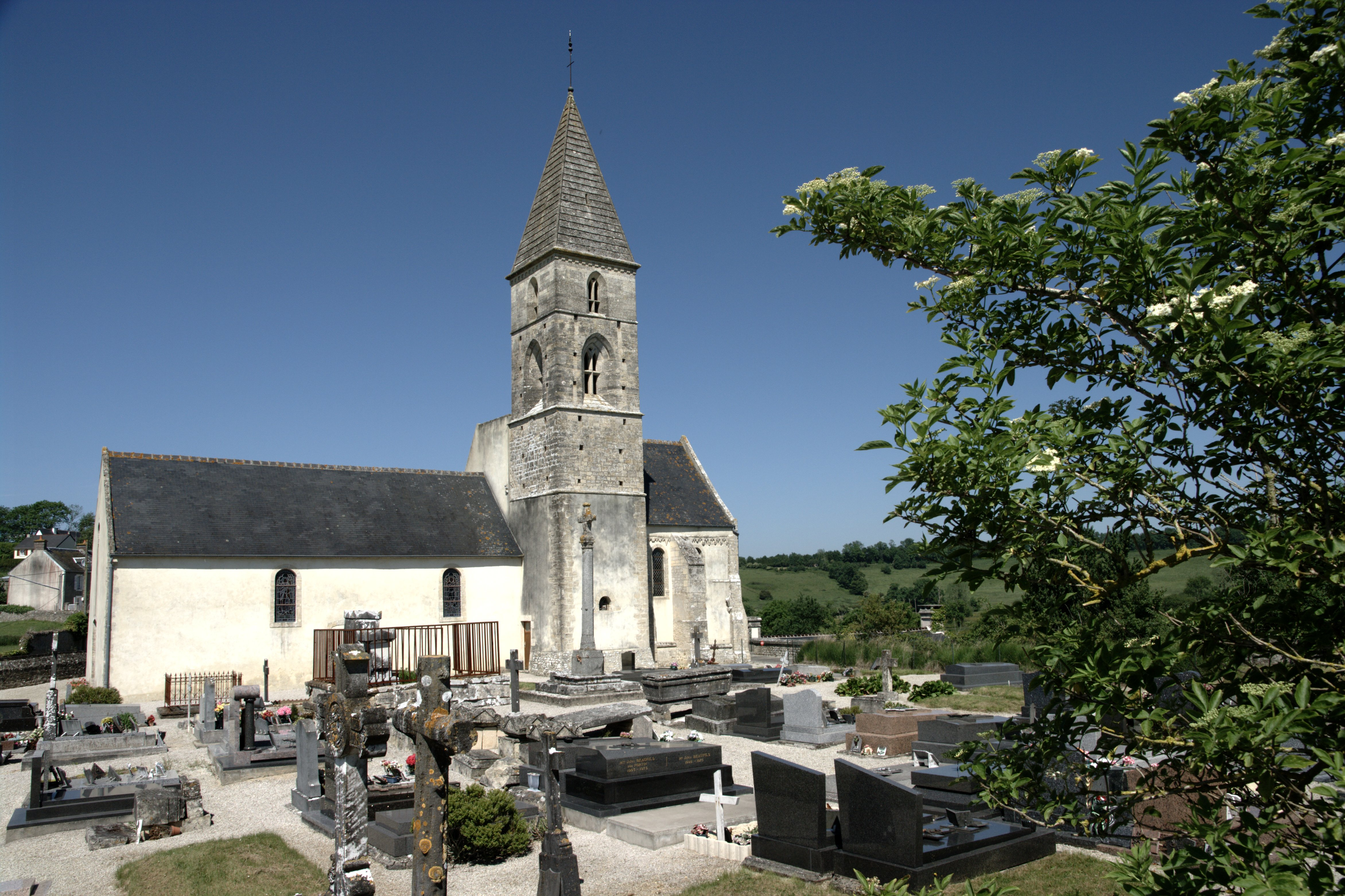 L'église de Aignerville, Calvados.